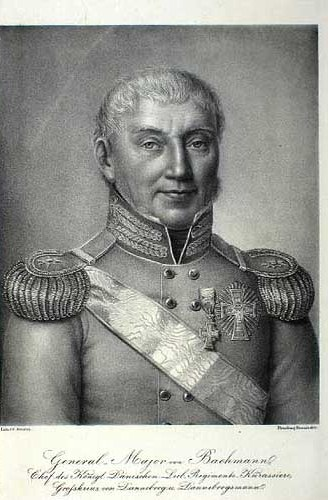 Hans Bachmann (1752-1841), Danish general